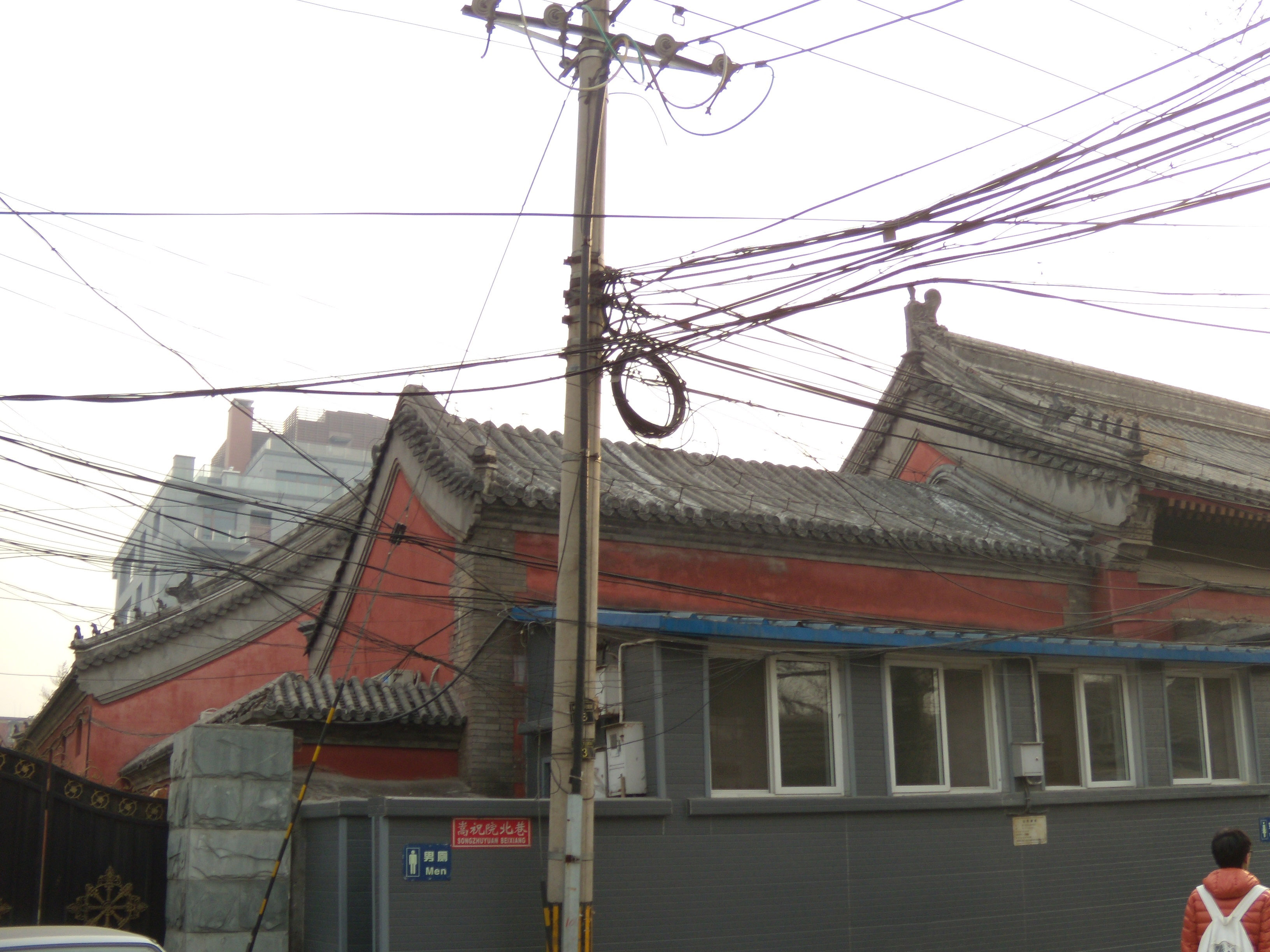 嵩祝寺北侧